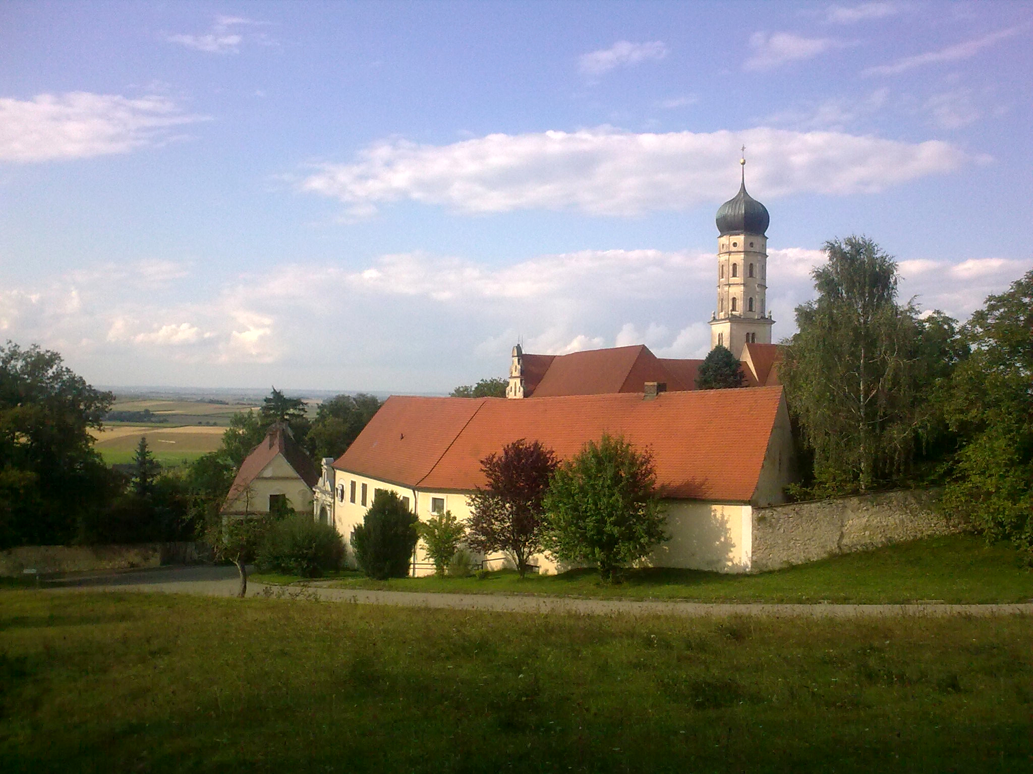 Kloster Mönchsdeggingen (Landkreis Donau-Ries, Bayern)